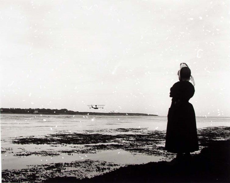 Bigoudène regardant un hydravion amerrir à l'Île-Tudy (1917, photo de Jacques de Thézac, muse départemental breton)